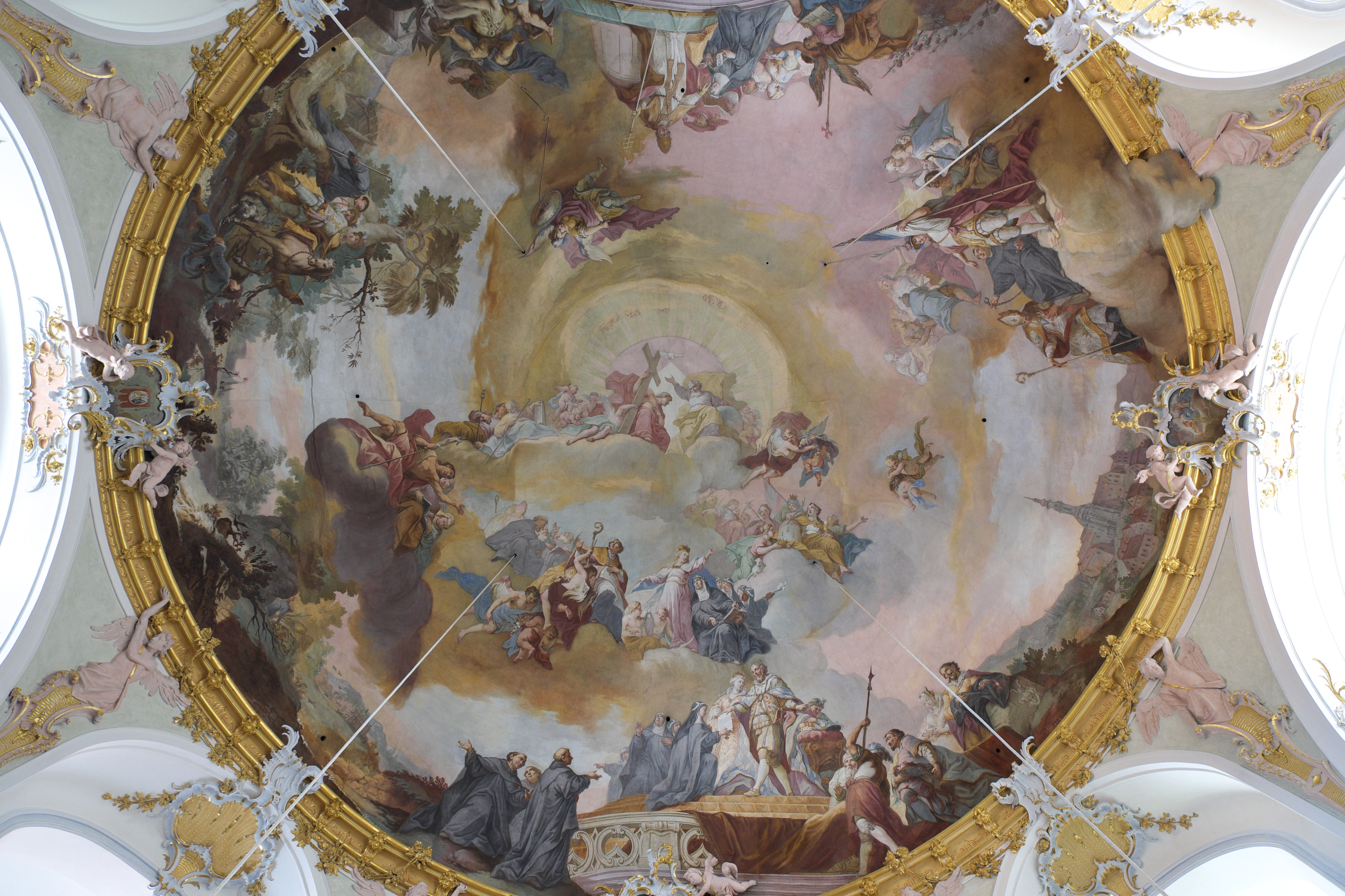 Katholische Pfarr- und Klosterkirche St. Alto und St. Birgitta in Altomünster im Landkreis Dachau (Bayern), Kuppelfresko (signiert 1767) von Joseph Mages (1728–1769), Darstellung: Herzog Georg der Reiche von Landshut und seine Gemahlin, Jadwiga, überreichen am 21. Januar 1497 den Brigitten-Nonnen die Schenkungsurkunde für das Kloster; darüber: hl. Alto und hl. Richard Reynolds (links), Maria und Schwestern (rechts); in der Mitte: hl. Dreifaltigkeit; oben: Brigitta erhält von Papst Urban V. die Bestätigung ihrer Ordensregel